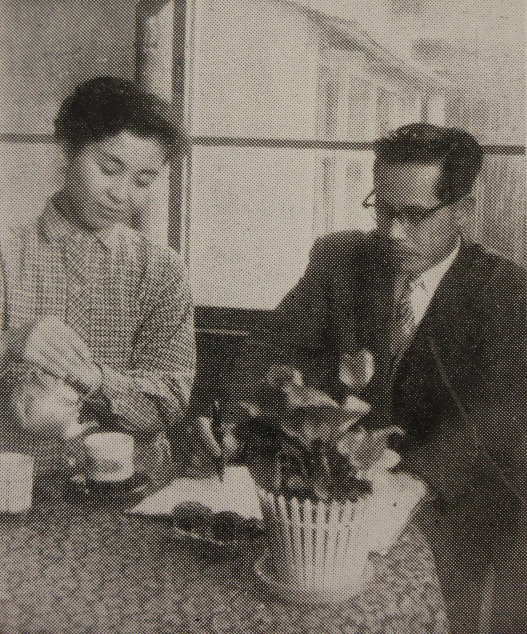 愛知新聞社社長だった内田喜久とその妻。